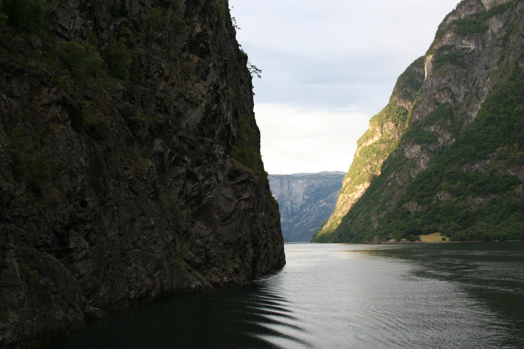 Nærøyfjord